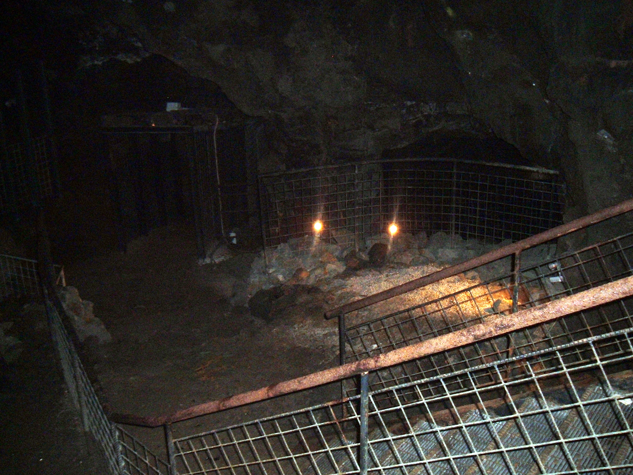 Parco minerario di San Silvestro, located in Campiglia Marittima, Tuscany, Italy. Miniera del Temperino